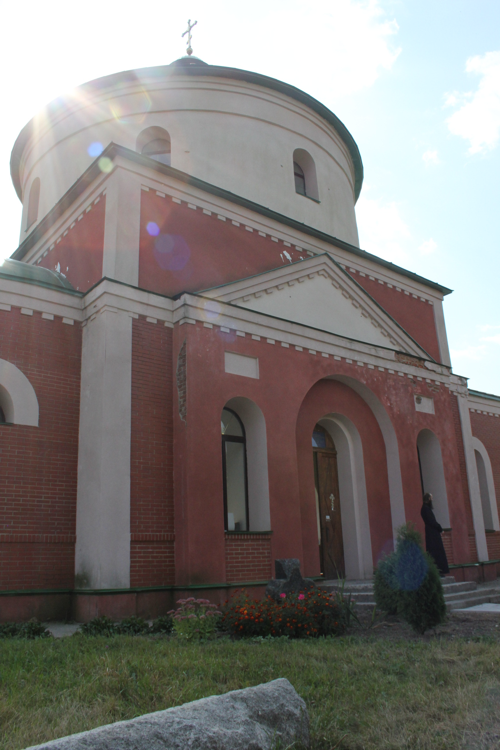 Церква Успіння Пресвятої Богородиці, село Костянтинів